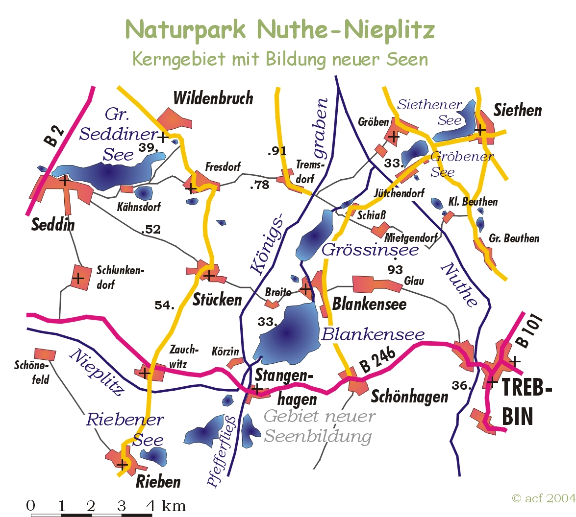 Karte „Naturpark Nuthe-Nieplitz“, Kerngebiet der Seen, Kartografie: Acf 2004